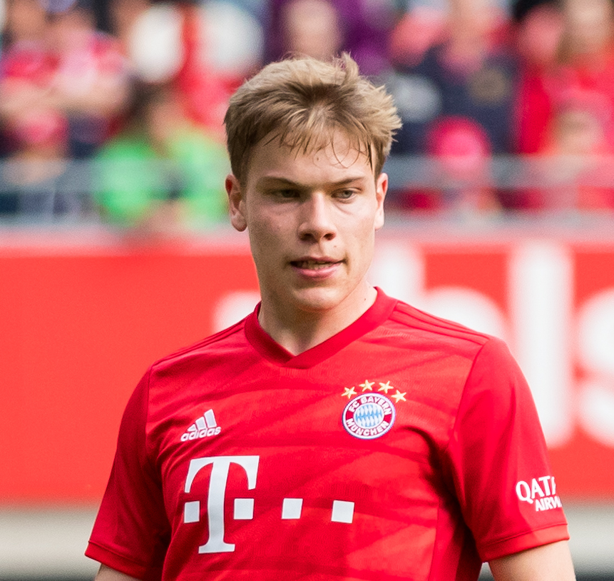 during 1.FC Kaiserslautern vs FC Bayern München at Fritz-Walter-Stadion, Kaiserslautern, Rheinland-Pfalz, Germany on 2019-05-27, Photo: Sven Mandel